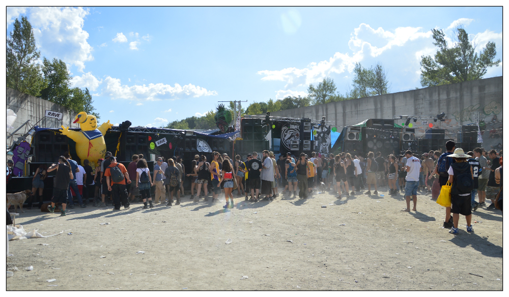 Free party Italy